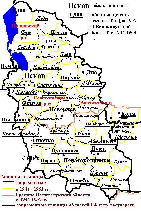 Псковская область. Районы в 1957 году